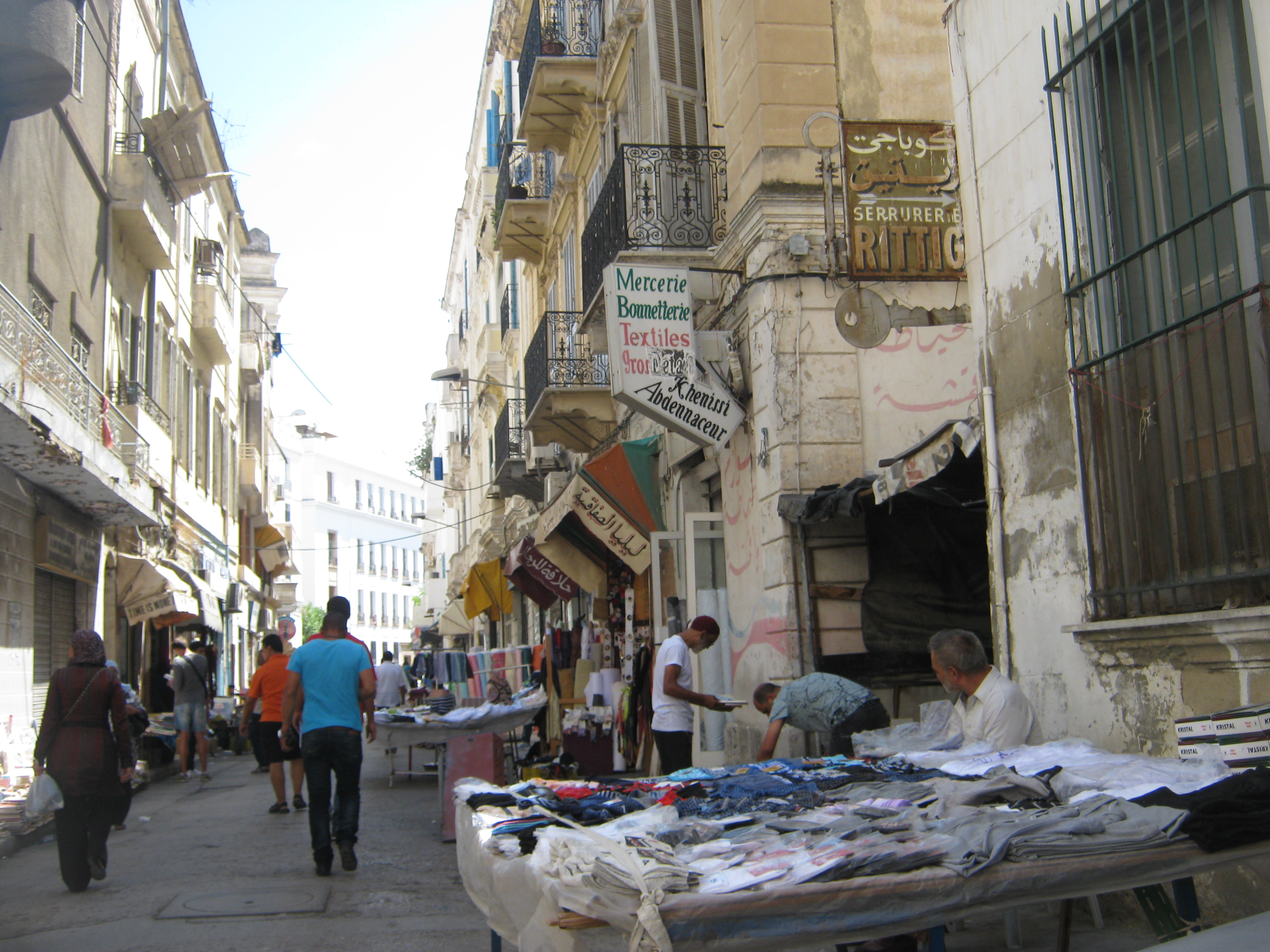 Rue des tanneurs